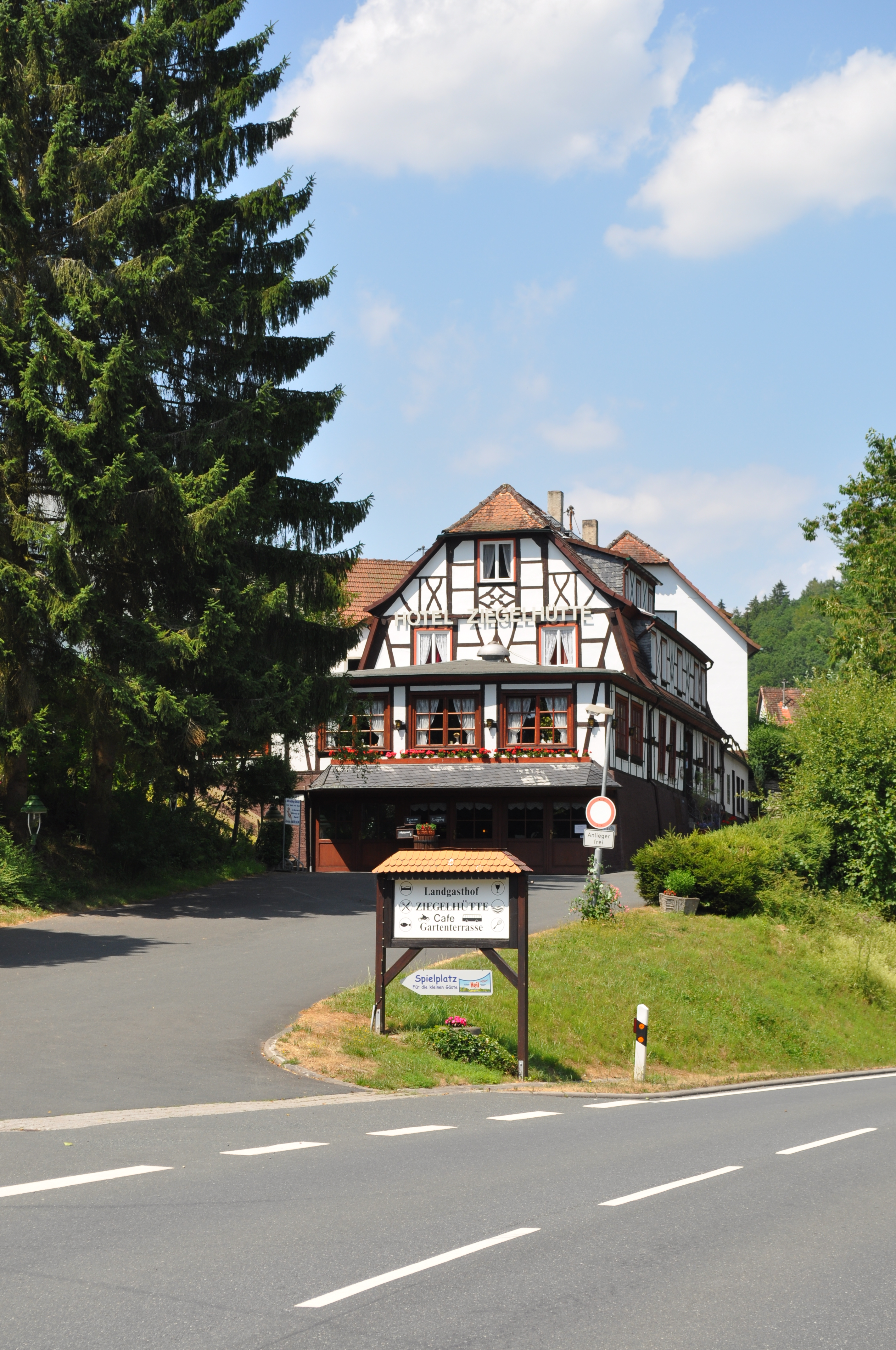 Weilrod, Ziegelhütte